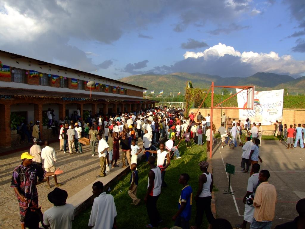 Image d'un après-match au Centre Jeunes Kamenge (été 2013)